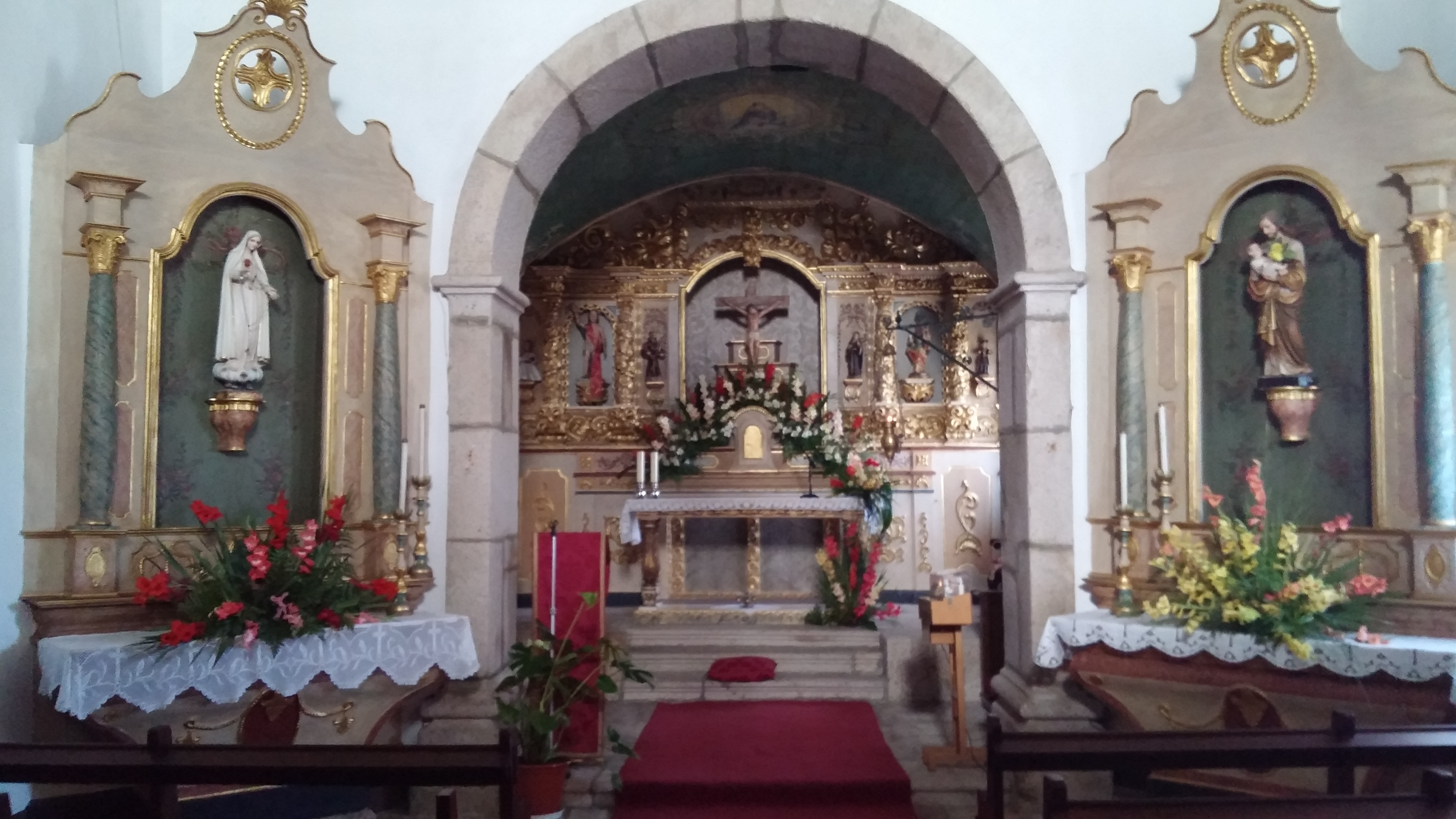 Chapelle São Sebastião de Ferronha